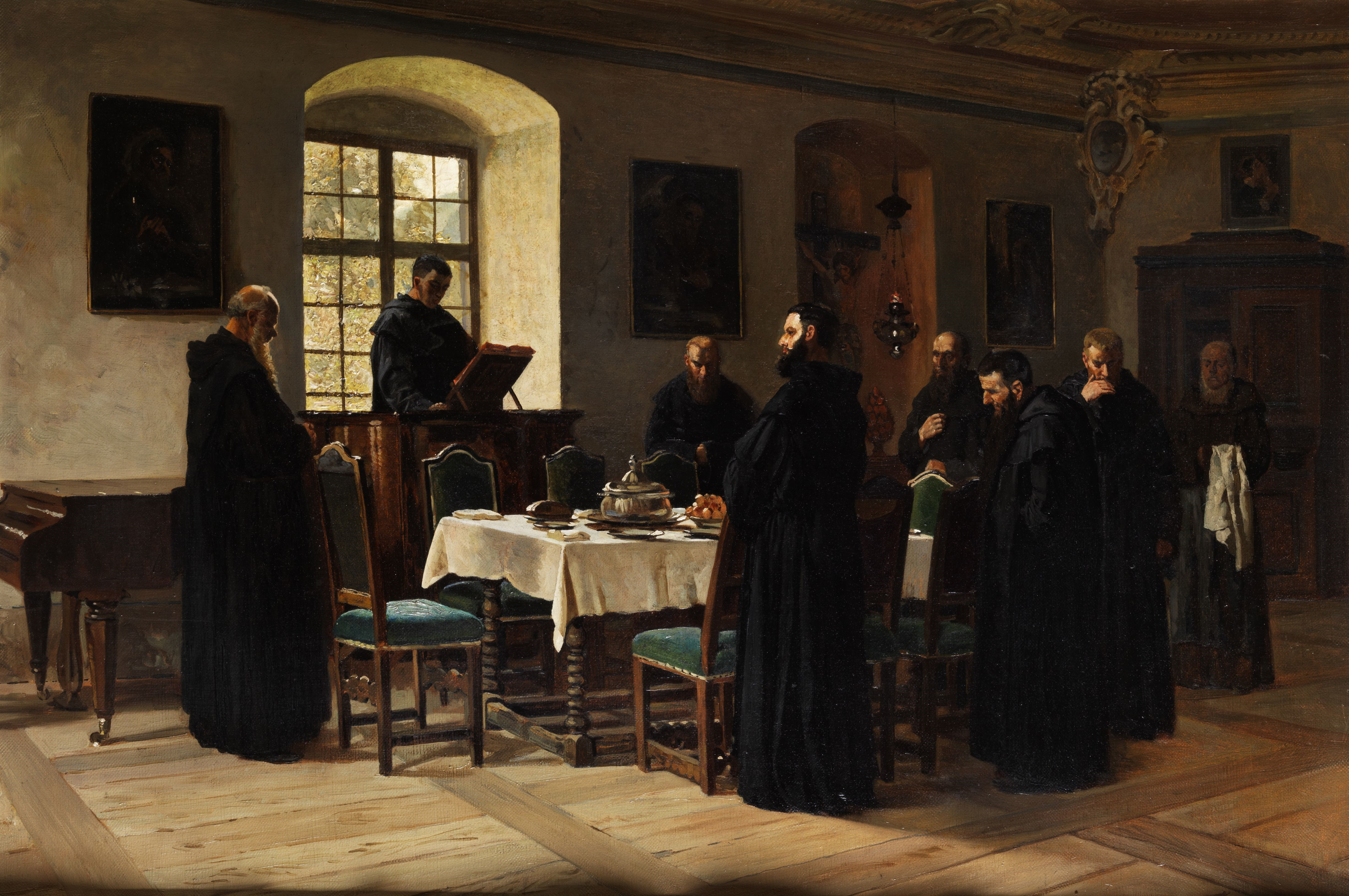 Mönche im Refektorium. Öl auf Leinwand. 49,5 x 73,5 cm.